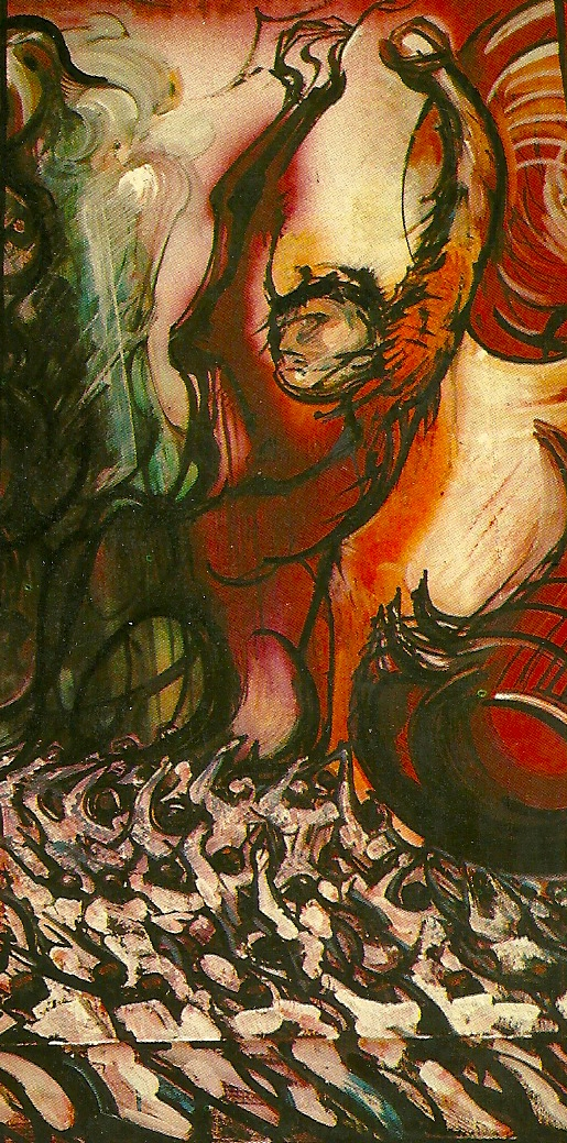 foto de siqueiros y su mural en el df